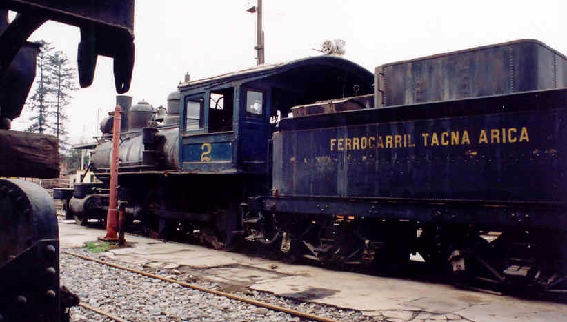 Museo del Ferrocarril Tacna publicado en